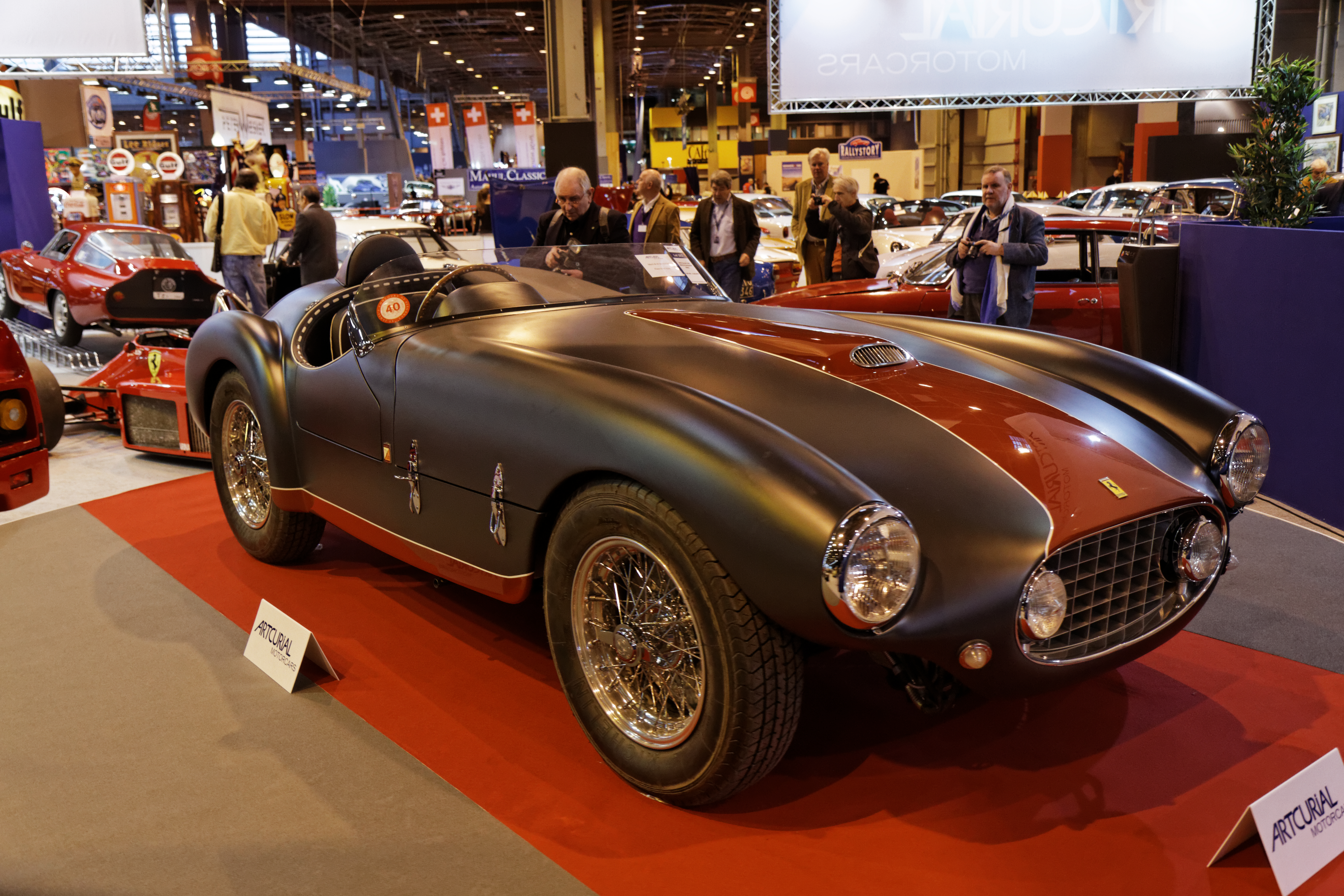 Une Ferrari 166 MM-53 barquette Oblin exposée lors du salon Retromobile 2014